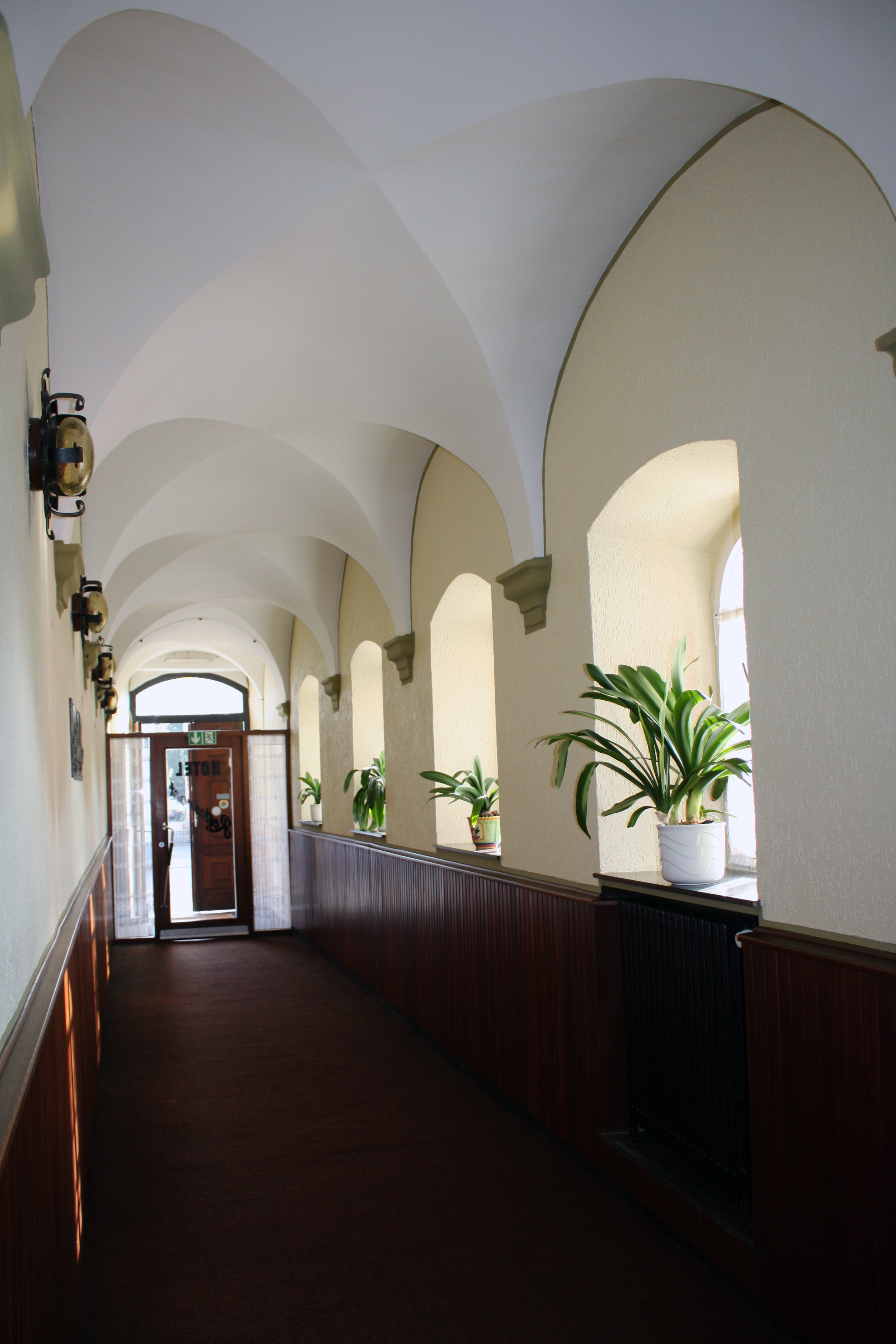 Lechenich, Hotel Franziskaner. Ehemaliger, nördlicher Kreuzgang des Klosters